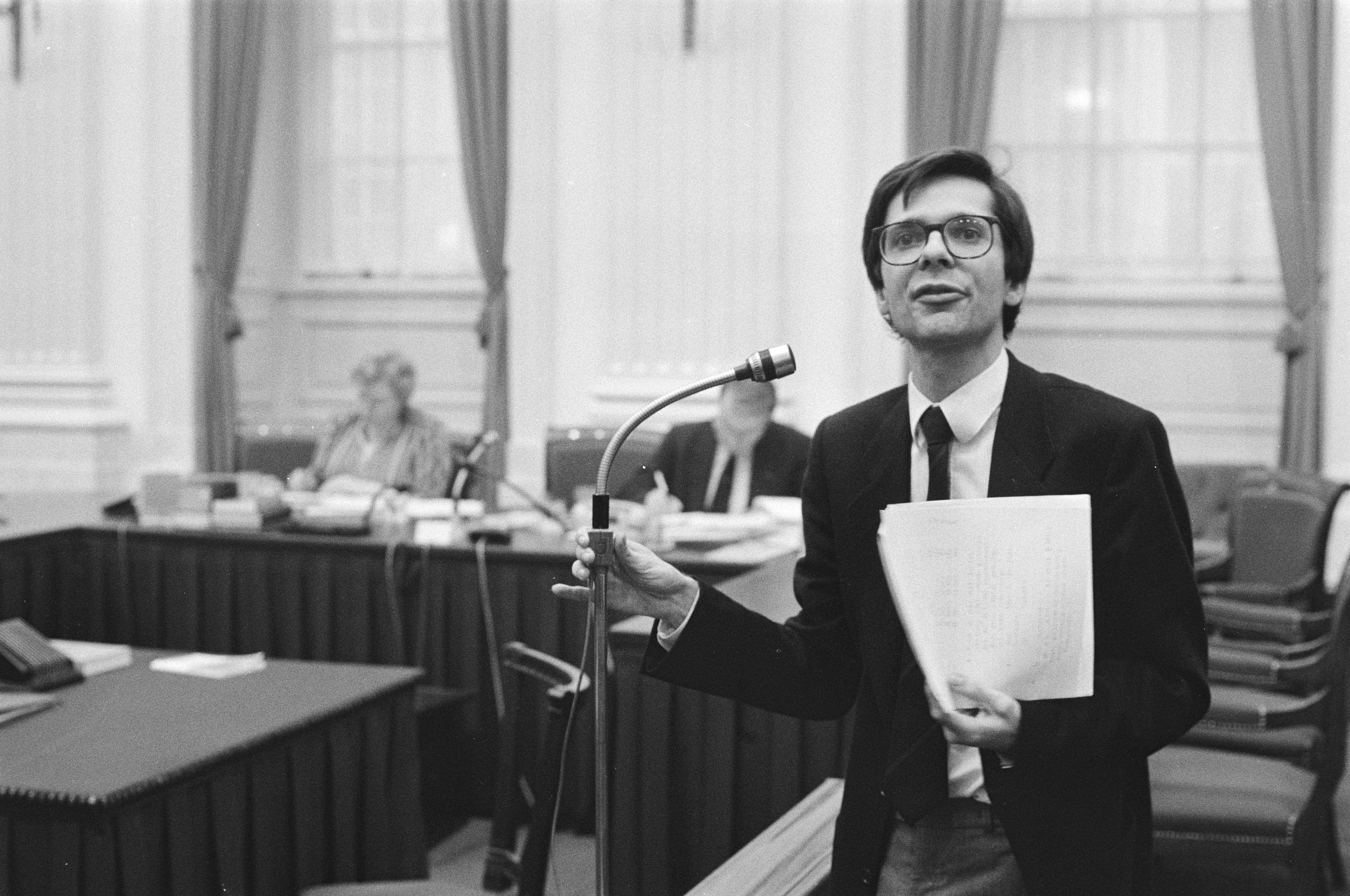 Collectie / Archief : Fotocollectie Anefo Reportage / Serie : [ onbekend ] Beschrijving : Tweede Kamer , debat over tweeverdieners; VVD-woordvoerde De Grave aan de interruptiemicrofoon Datum : 31 oktober 1984 Trefwoorden : kamerdebatten Persoonsnaam : De Grave Instellingsnaam : Tweede Kamer, VVD Fotograaf : Croes, Rob C. / Anefo Auteursrechthebbende : Nationaal Archief Materiaalsoort : Negatief (zwart/wit) Nummer archiefinventaris : bekijk toegang 2.24.01.05 Bestanddeelnummer : 933-1319